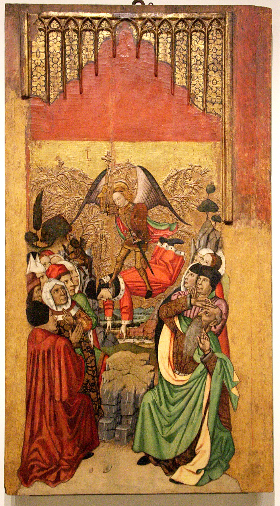 Un dels plafons del retaule de Sant Miquel dels Revenedors. Al MNAC es conserven sis compartiments del mateix conjunt. El retaule procedeix de la capella del gremi dels Tenders i Revenedors, a l'església de Santa Maria del Pi, Barcelona.